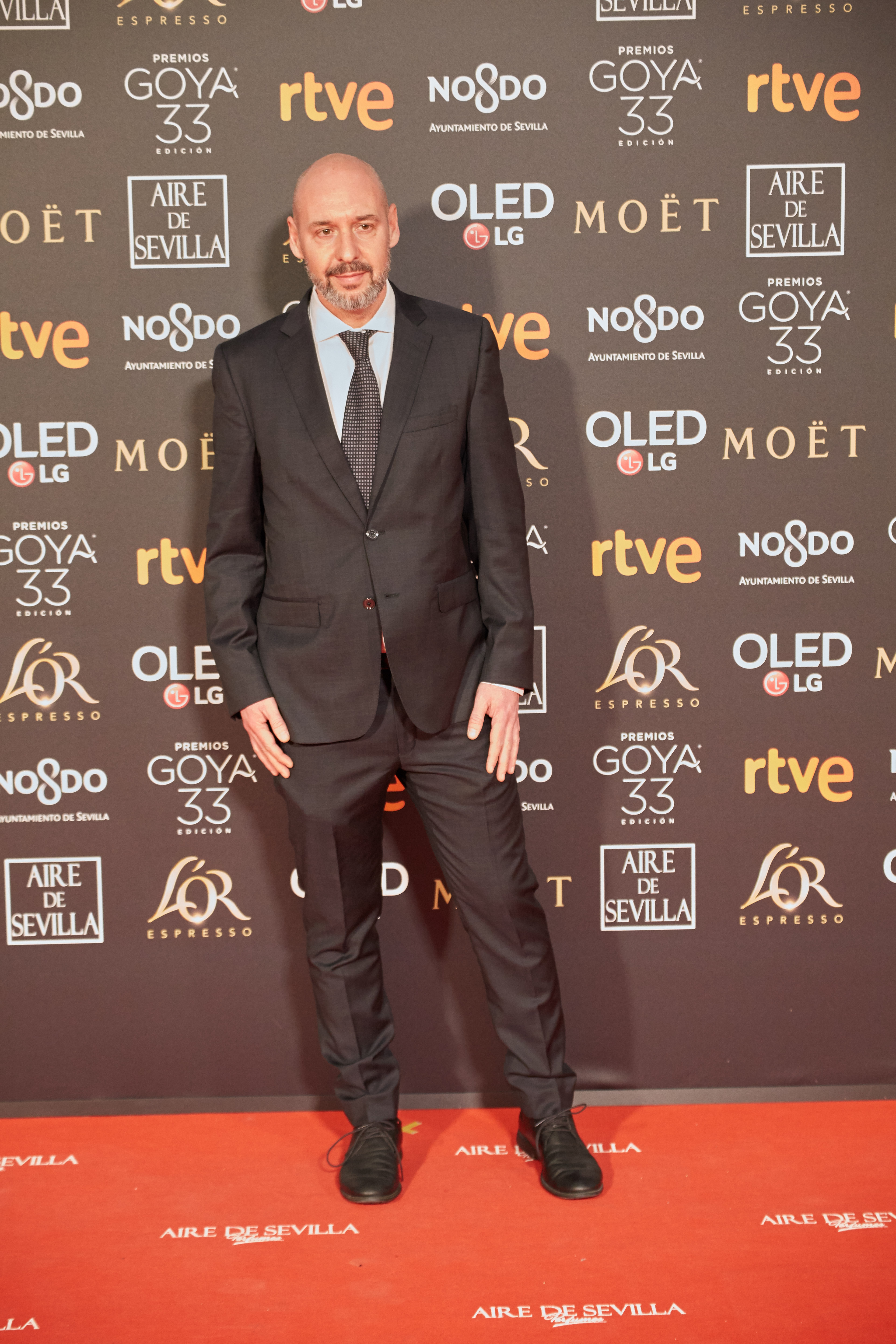 Jaume Balagueró en la alfombra roja de los Premios Goya celebrados en Sevilla en Febrero 2019